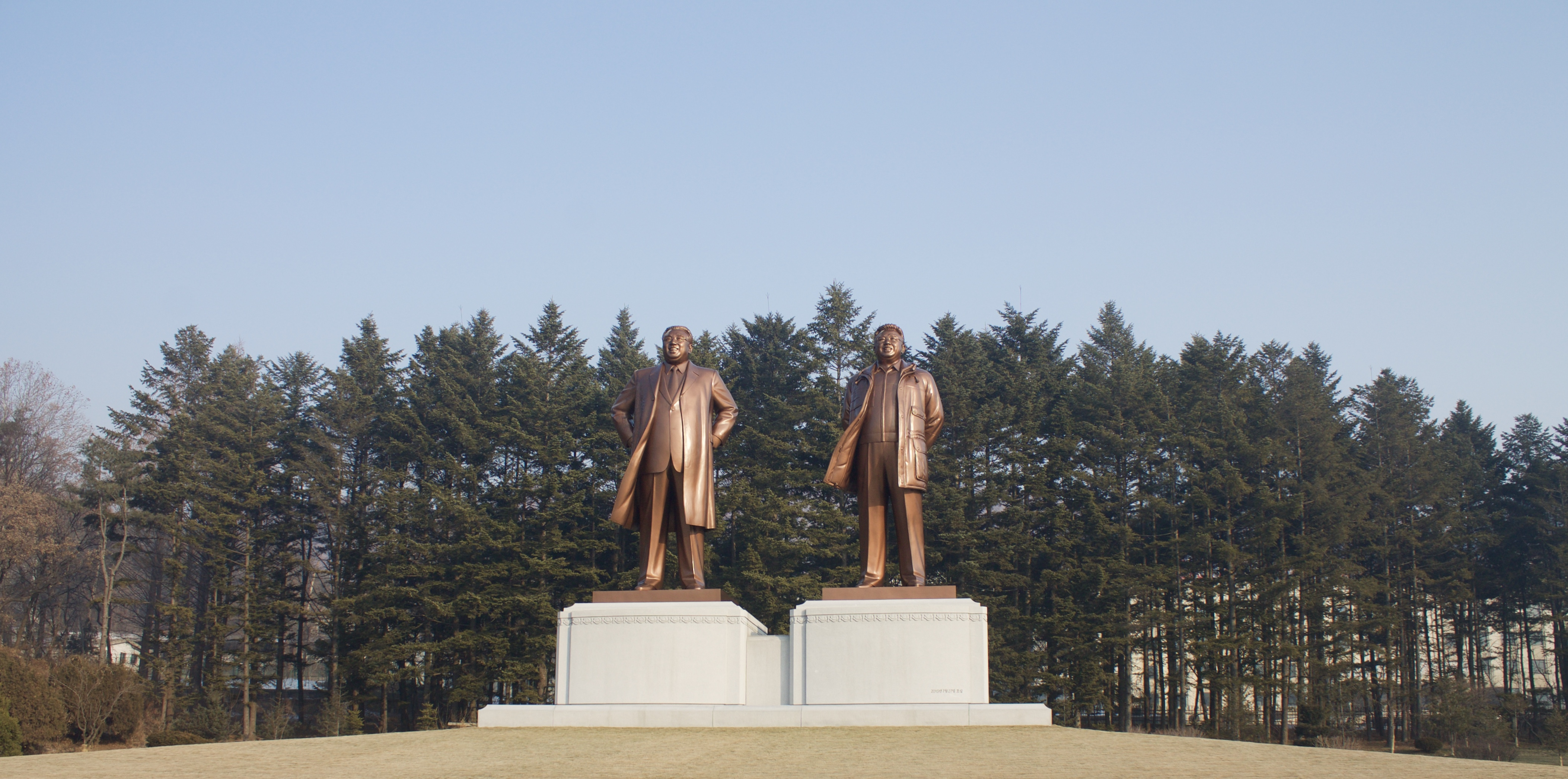 Kims